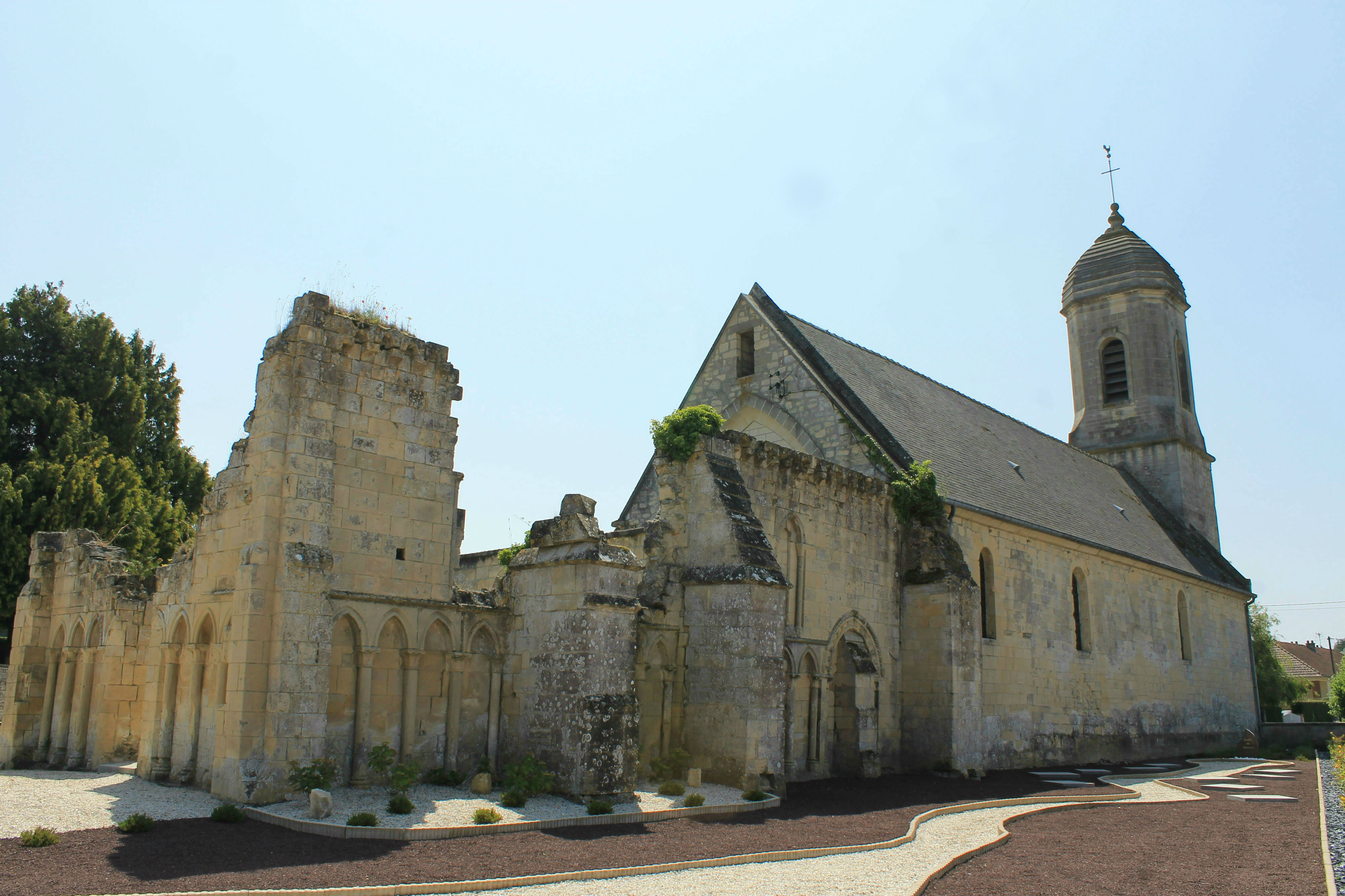 Église Saint-André de Cristot (Calvados)